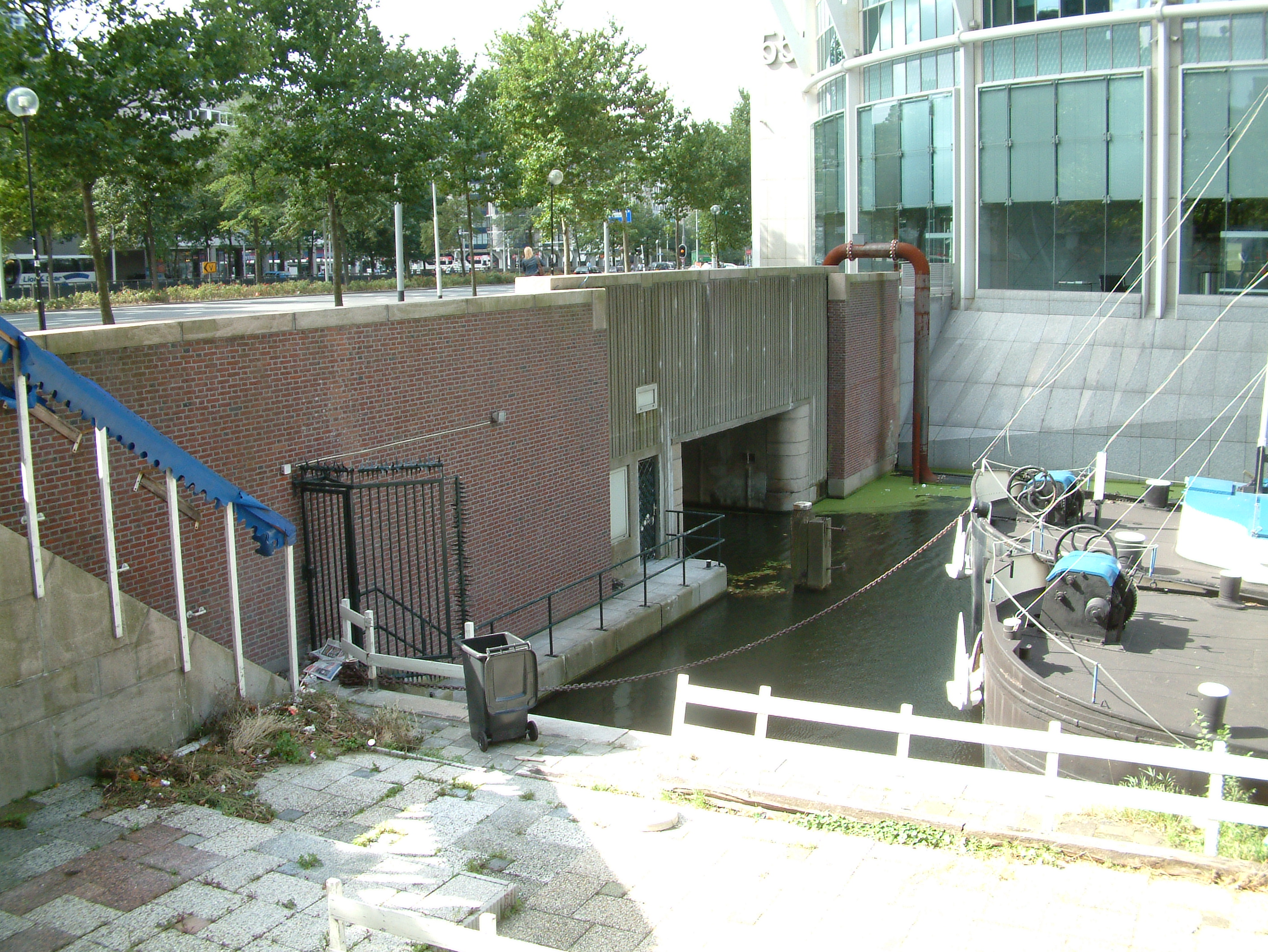 Bruggen over de Rotte, Het gewelf onder de Blaak naar de afgesloten Leuvesluis, noordkant